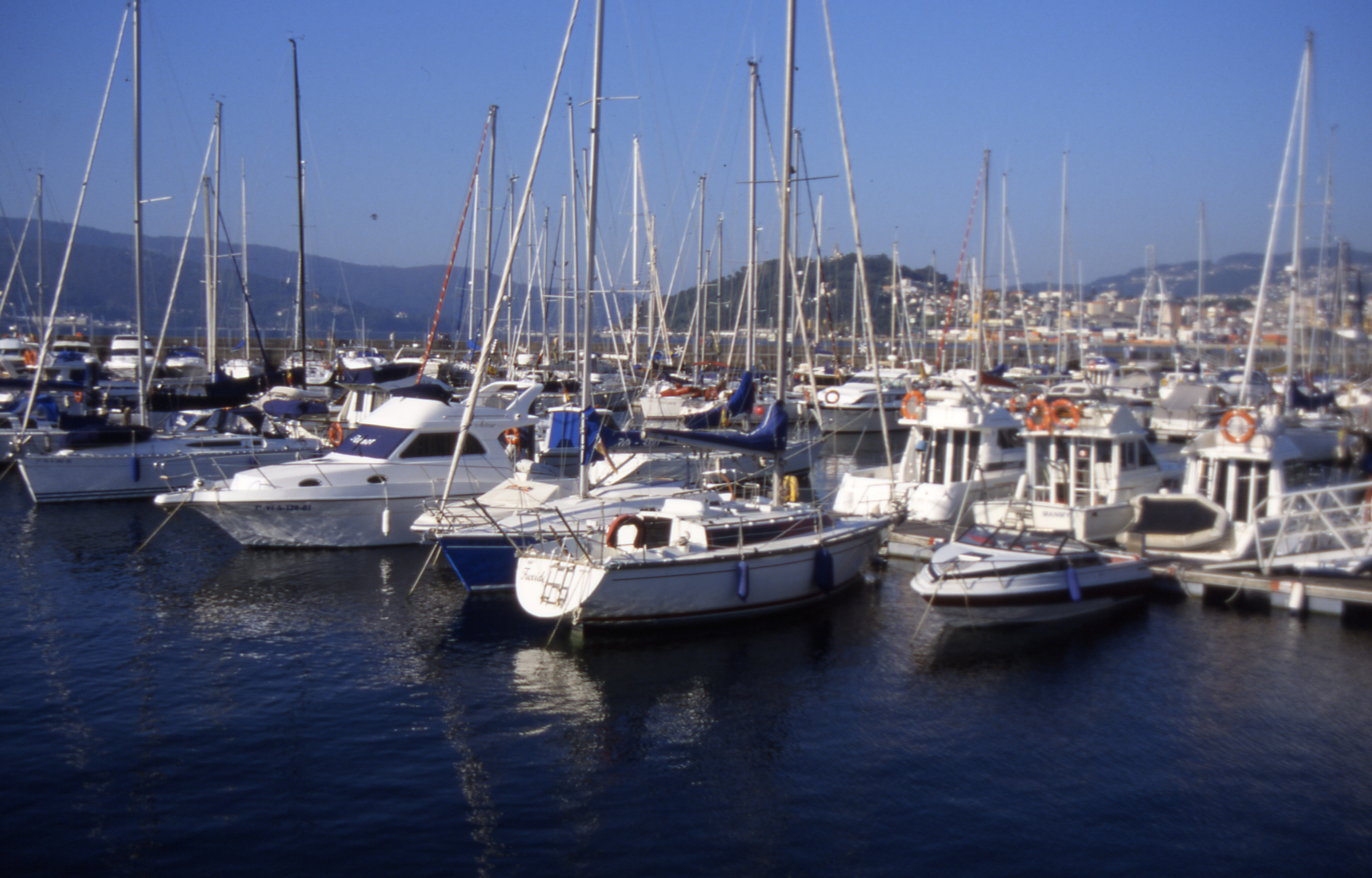 Vigi Yachthafen